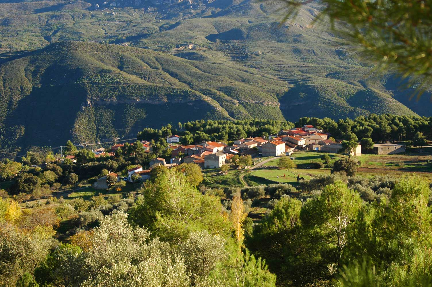 vista parcial de Moropeche